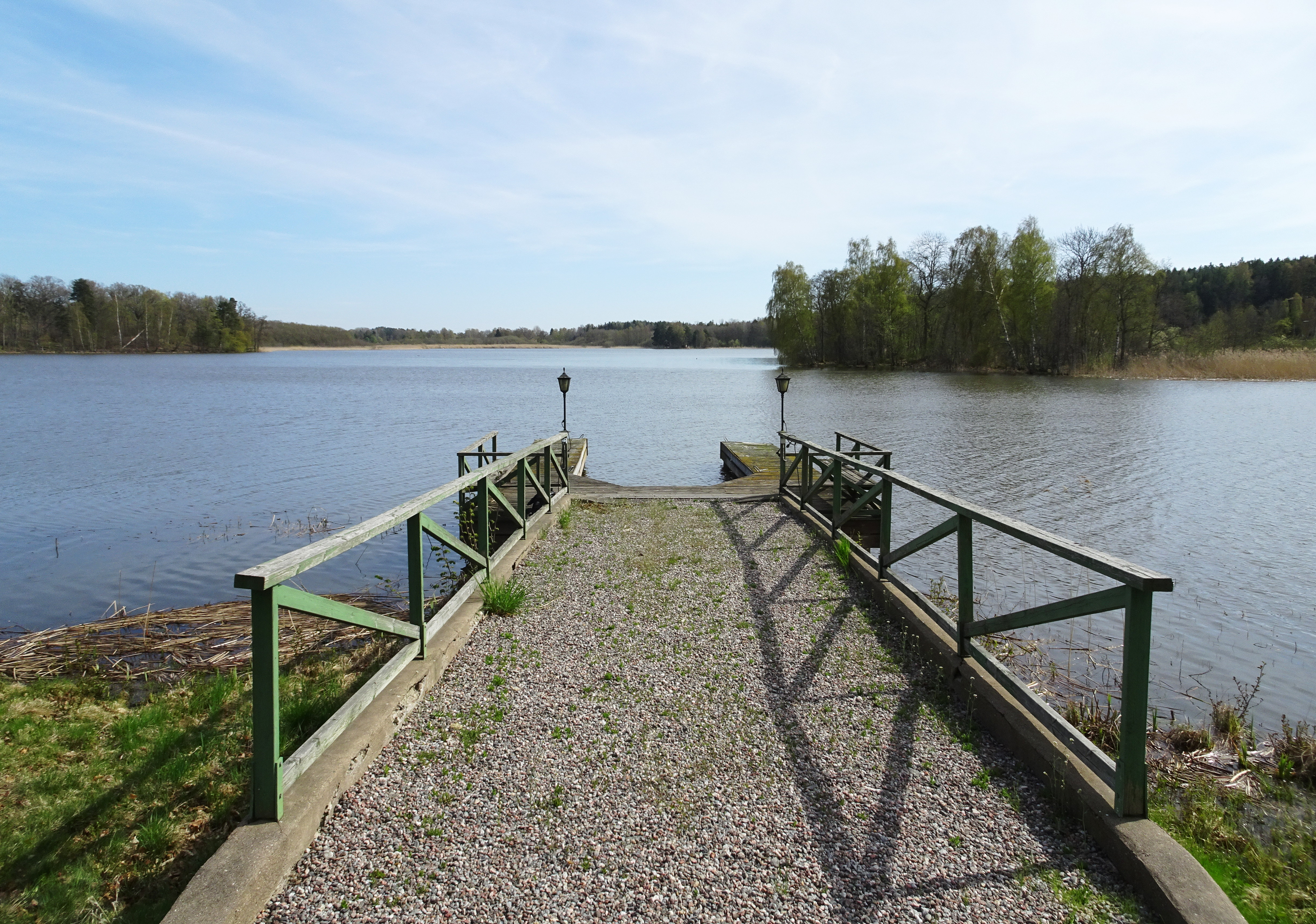 Brygga vid Säby gård, Säbyviken